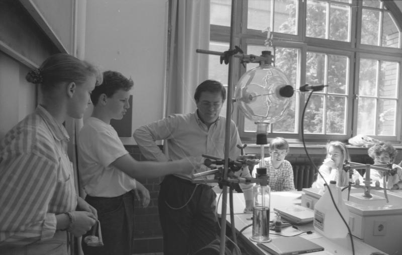 Juni 1988 Bonn: Gymnasium - Chemie Unterricht.